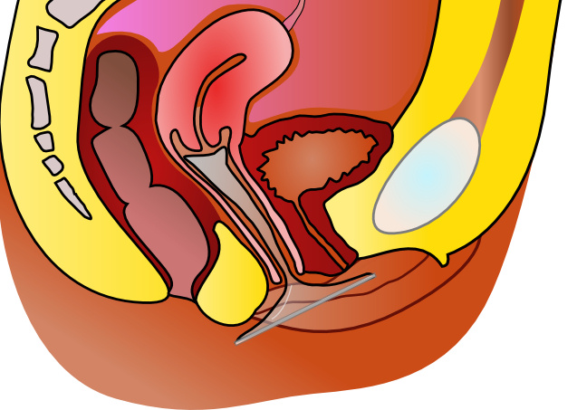 Ein eingeführtes Femidom (Kondom für die Frau)